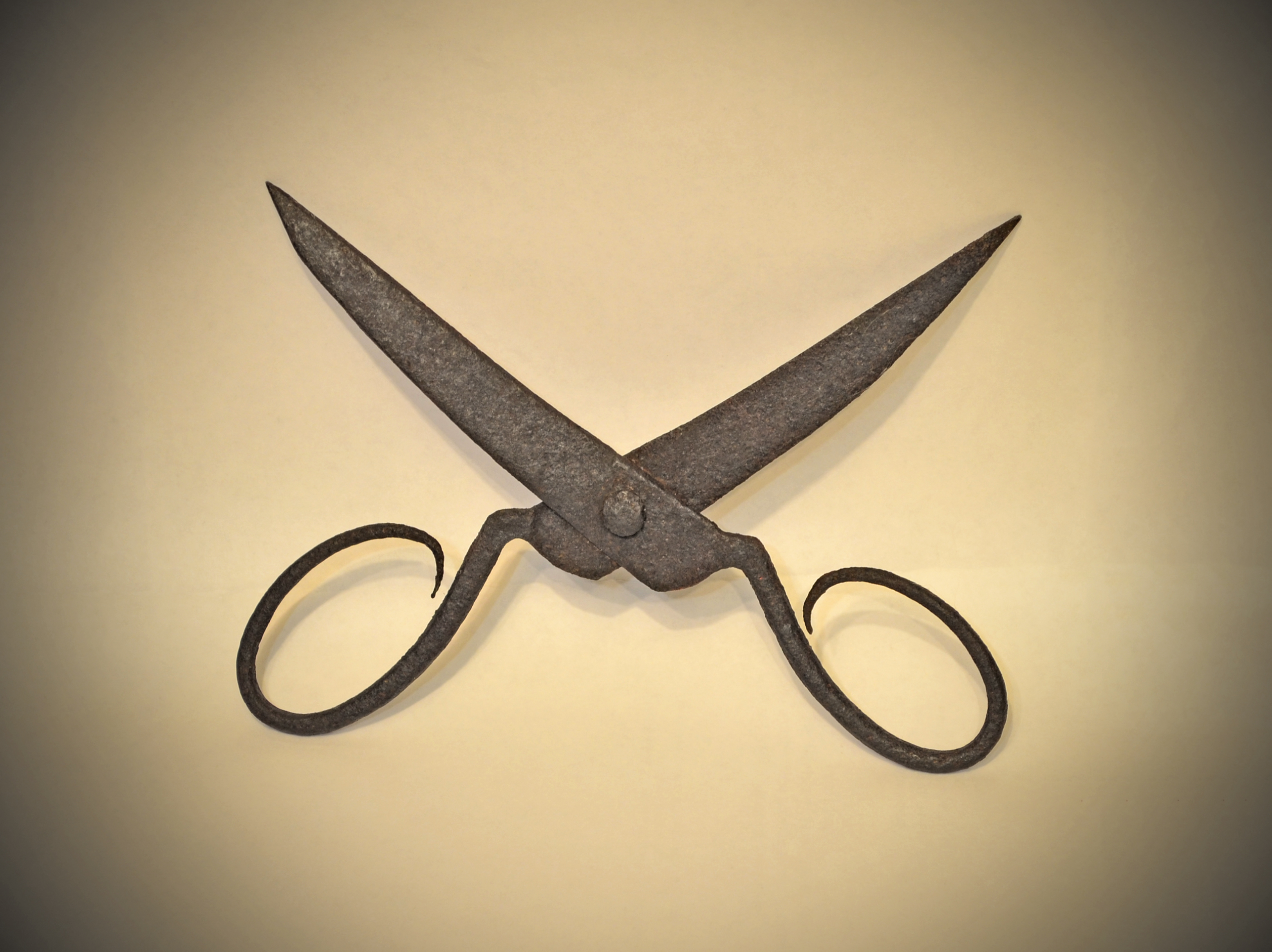 Ножницы.Россия,19 век.